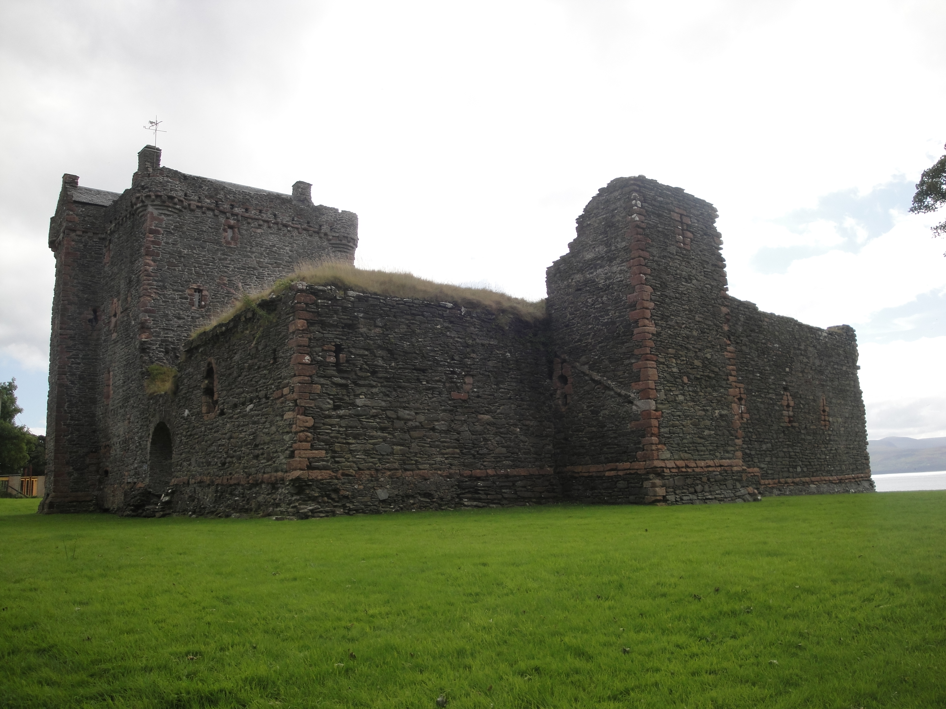 Château de Skipness